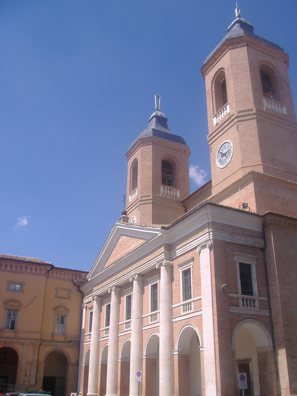 La Cattedrale del Duomo di Camerino